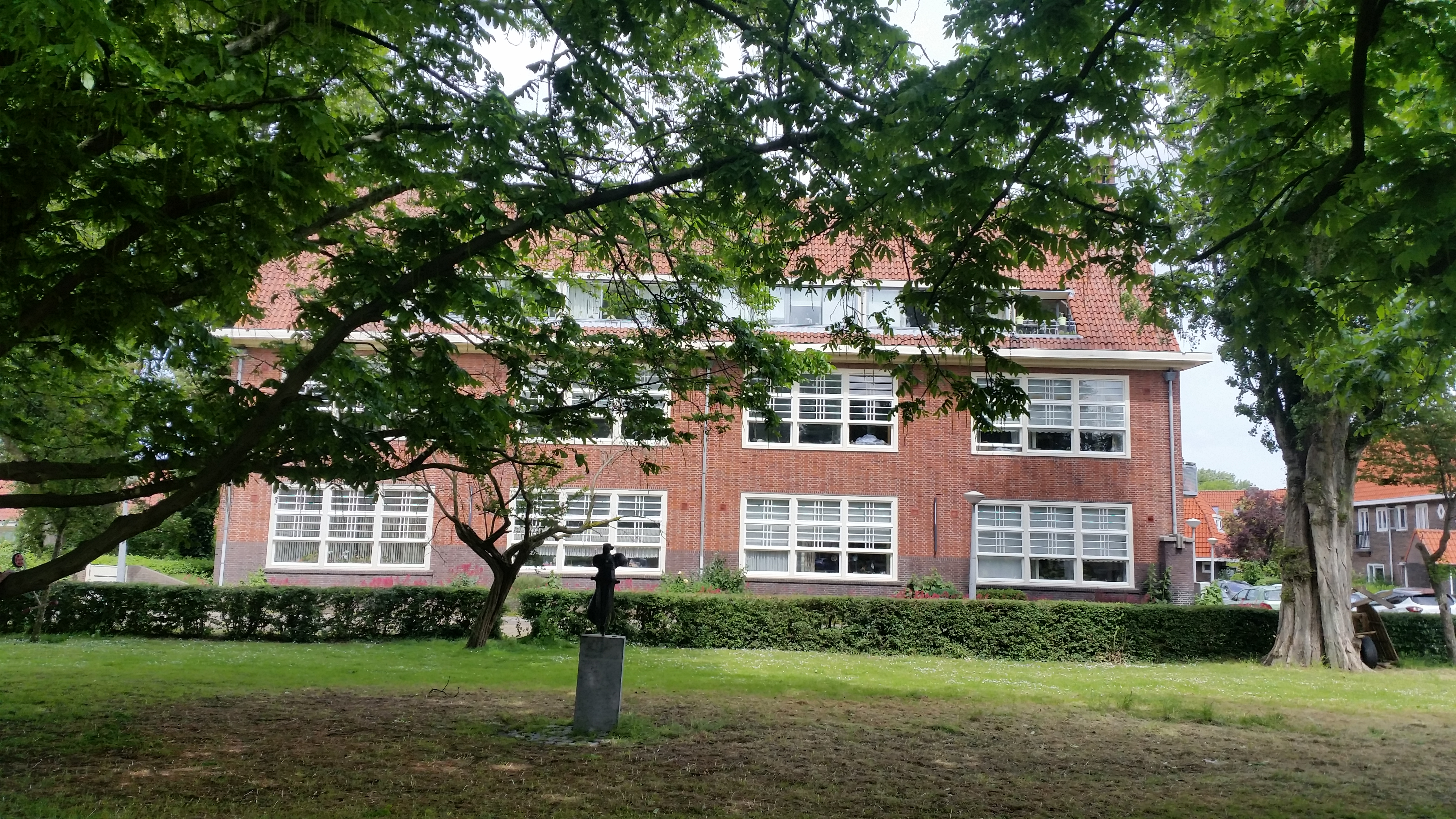 Voormalig schoolgebouw aan Purmerweg, hoek Schermstraat 3-19, Amsterdam-Noord. Ervoor het beeld danseres met tamboerijn.